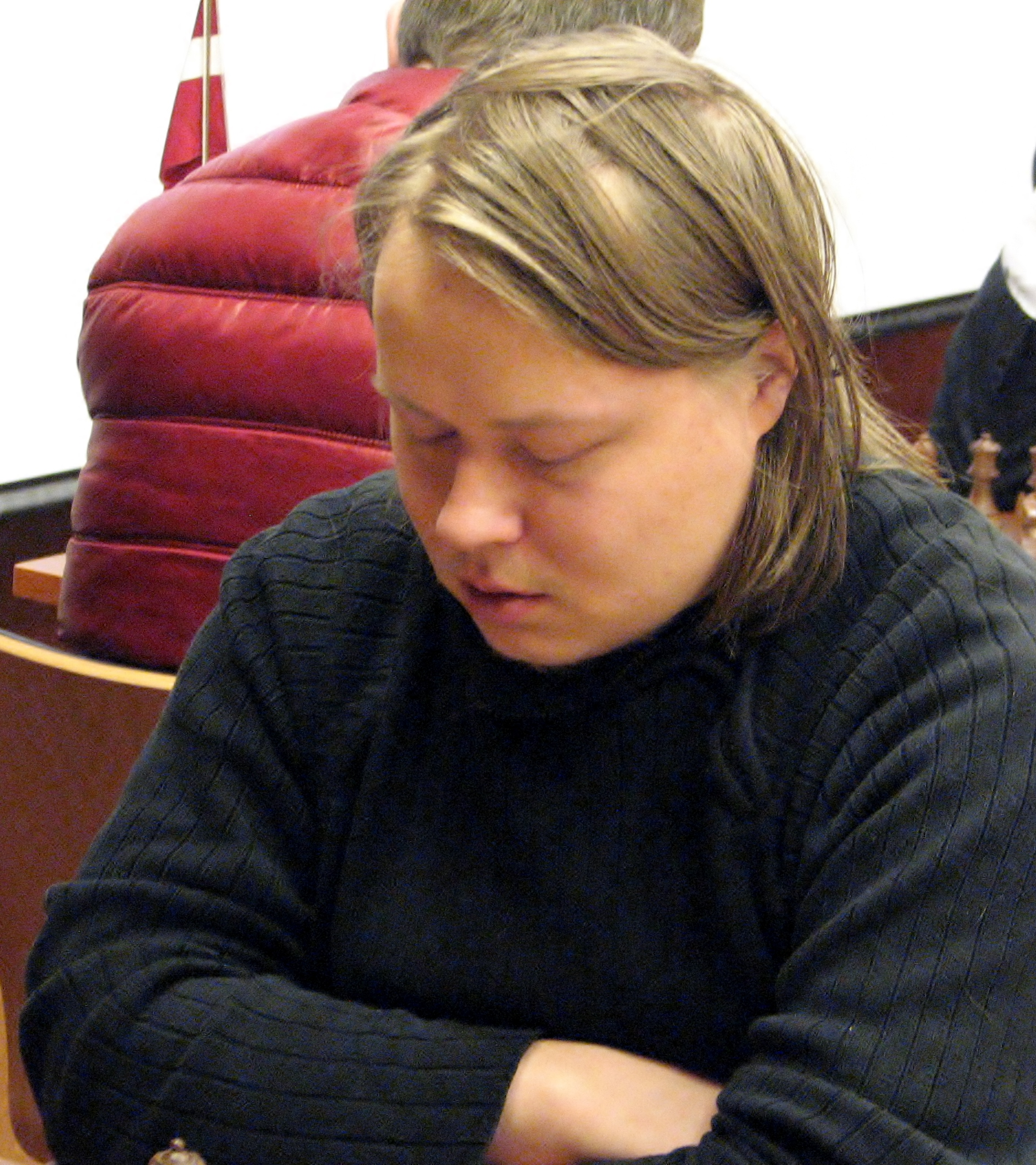 Tomi Nybäck kiirmaleturniiril "Meenutades Paul Kerest"